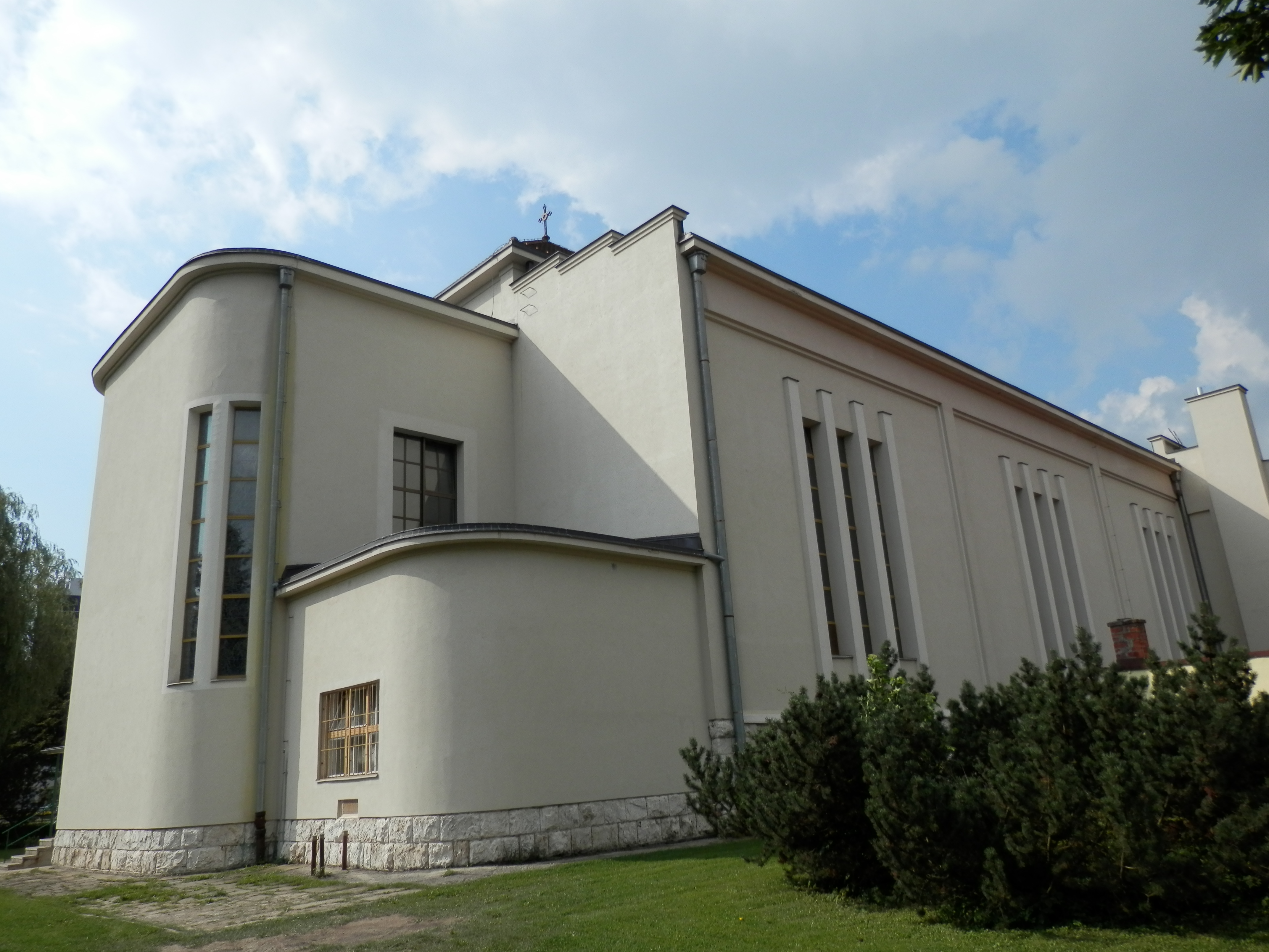 Konkatedrála Sedembolestnej Panny Márie v meste Poprad, región Spiš.